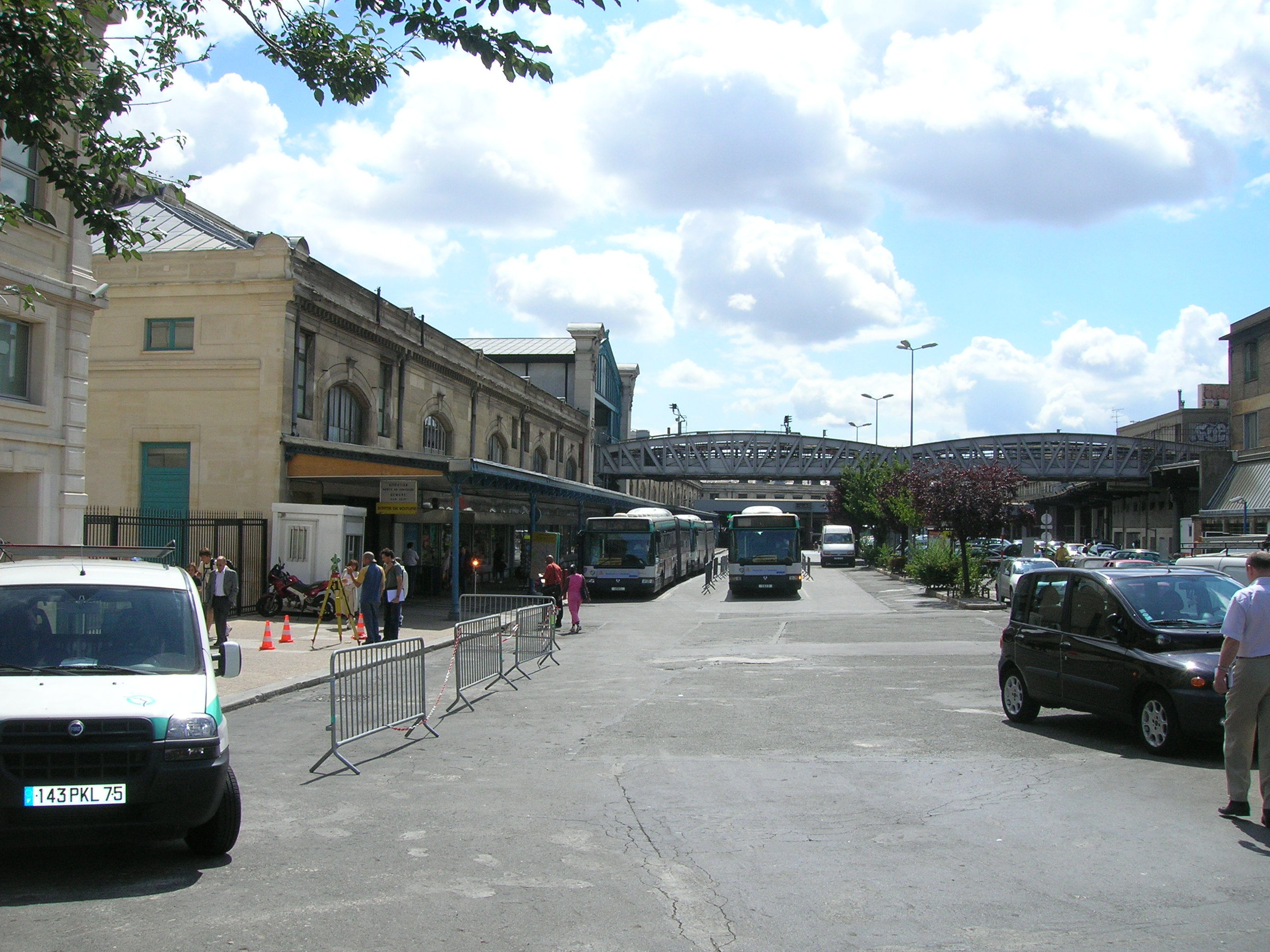 Gare d'Austerlitz, paris, la cour "Arrivées"